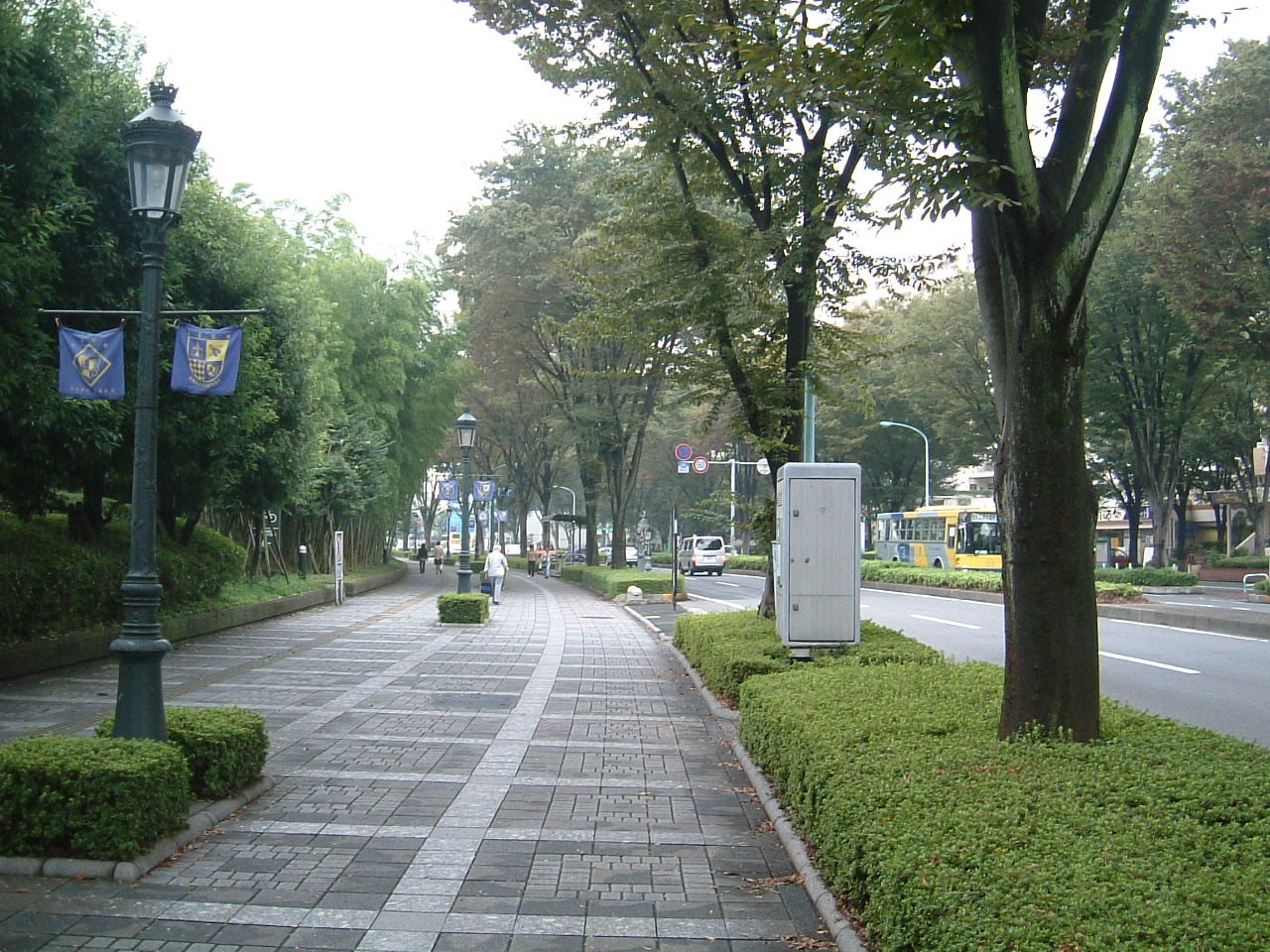 Street near Tokorozawa koukuu kinen kouen Saitama pref Japan (所沢航空記念公園)